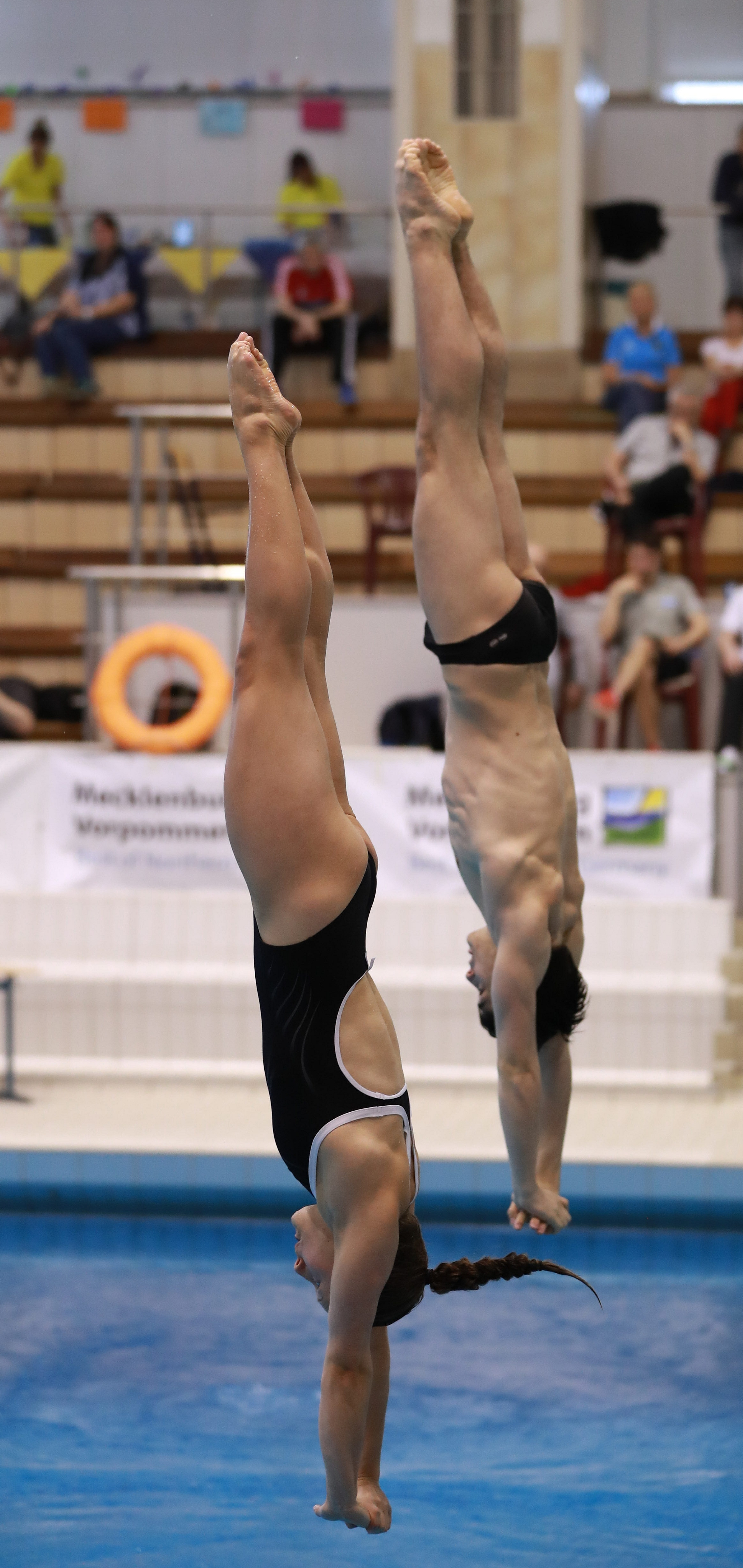 3m mixed Synchron Finale Sprung 1 bei den Internationalen Deutschen Hallenmeisterschaften im Wasserspringen Offene Klassen und Junioren. Abgebildet: Tina Punzel. Lou Massenberg.